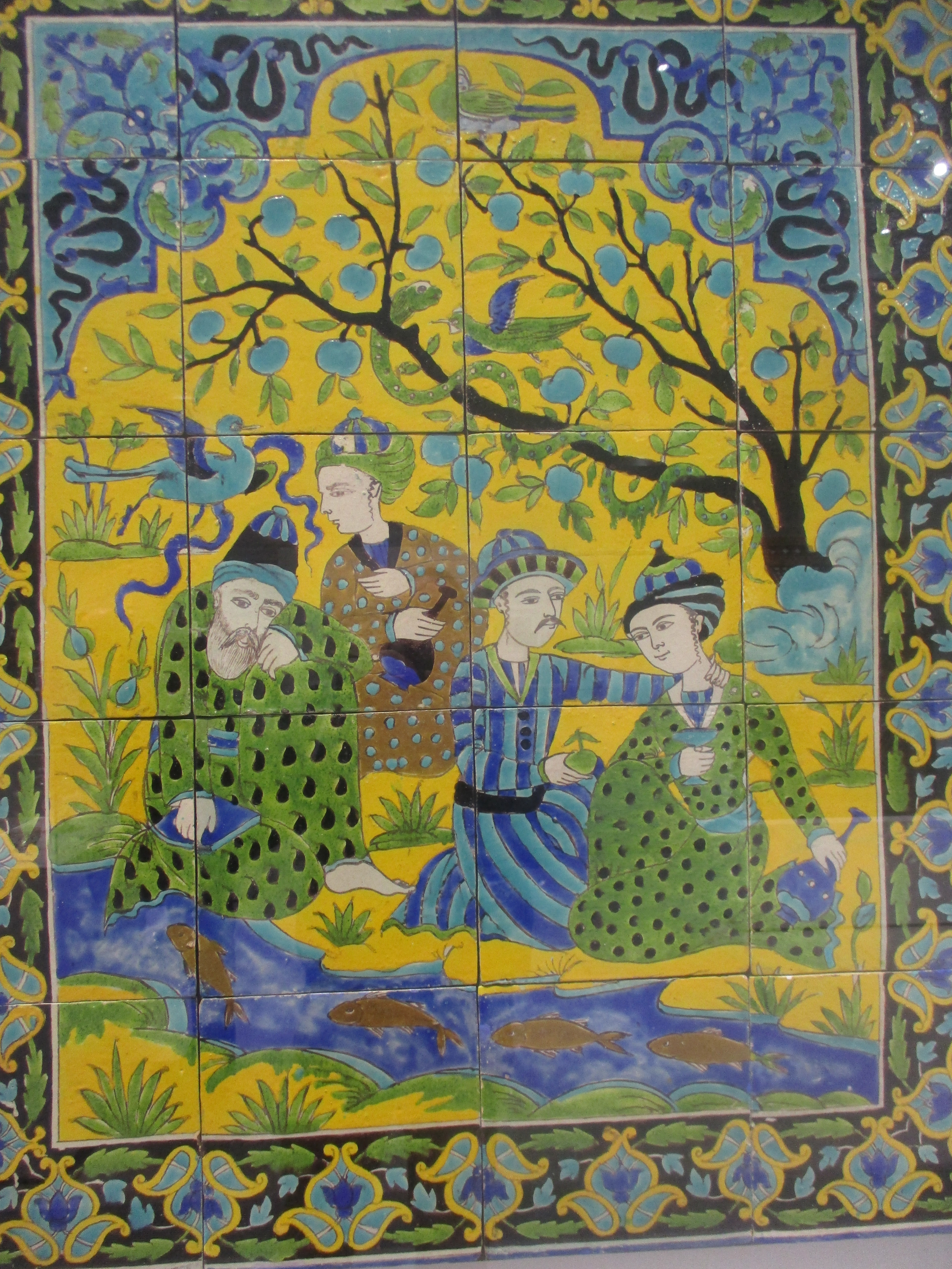 La provenance exacte de ce panneau est inconnue. Dans un jardin près d’une rivière poissonneuse, sous les branches d’un pommier où s’aventure un serpent, quatre mystiques musulmans (soufis) sont rassemblés. Le thème de la réunion d’amis est fréquent dans l’art iranien des 17e et 18e siècles. Les décors des palais safavides d’Ispahan rendent compte des plaisirs des sens et de l’esprit au milieu d’une nature luxuriante. Ce panneau est réalisé dans une technique que l’on nomme décor « à la ligne noire » : sur un fond blanc opaque, les formes sont dessinées à l’aide d’un trait noir qui isole les différentes glaçures colorées apposées ensuite unes à unes. Cette technique de décor, très employée dès le 16e siècle, devient l’un des principaux ornements des palais.